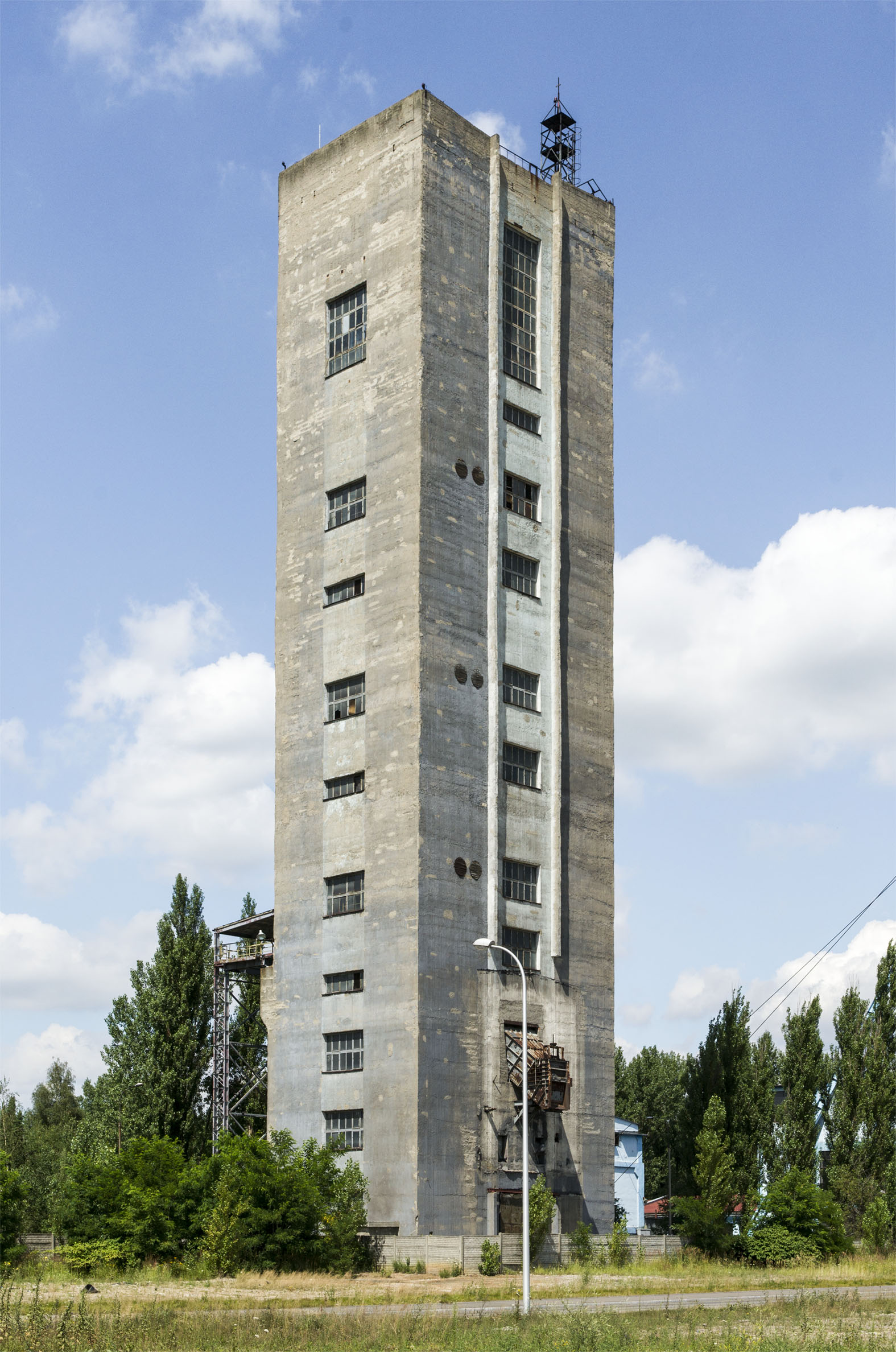 Bergwerk Jan Kanty, Jaworzno